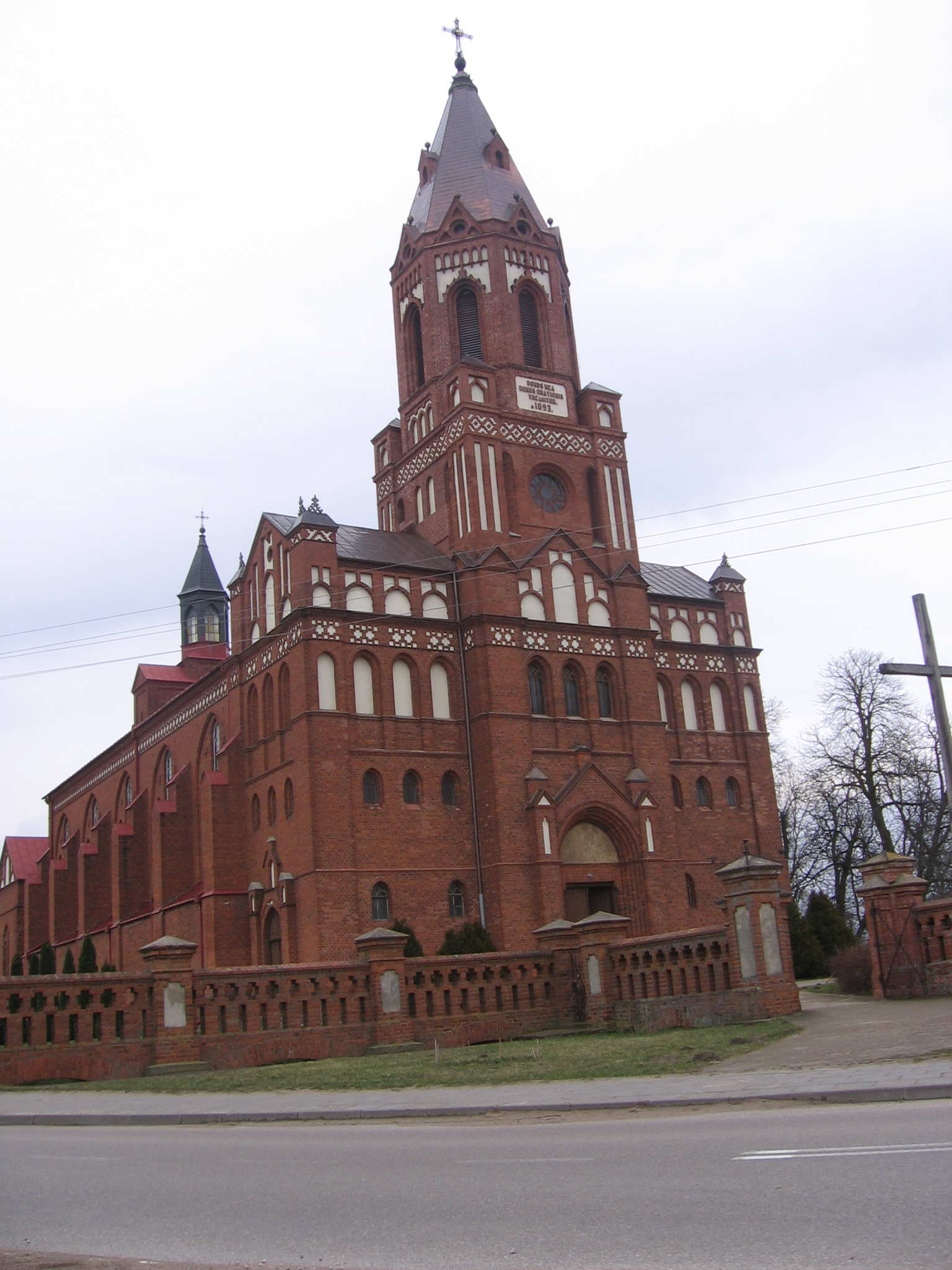 Kuczyn - kościół parafialny p.w. Zmartchwywstania Pańskiego, mur., 1888-1893 (zabytek nr A-280 z 23.03.1987)